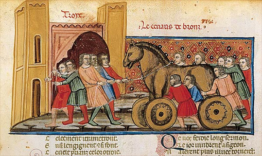 Benoît de Sainte-Maure, Roman de Troie. Venise ou Padoue, vers 1340-1350